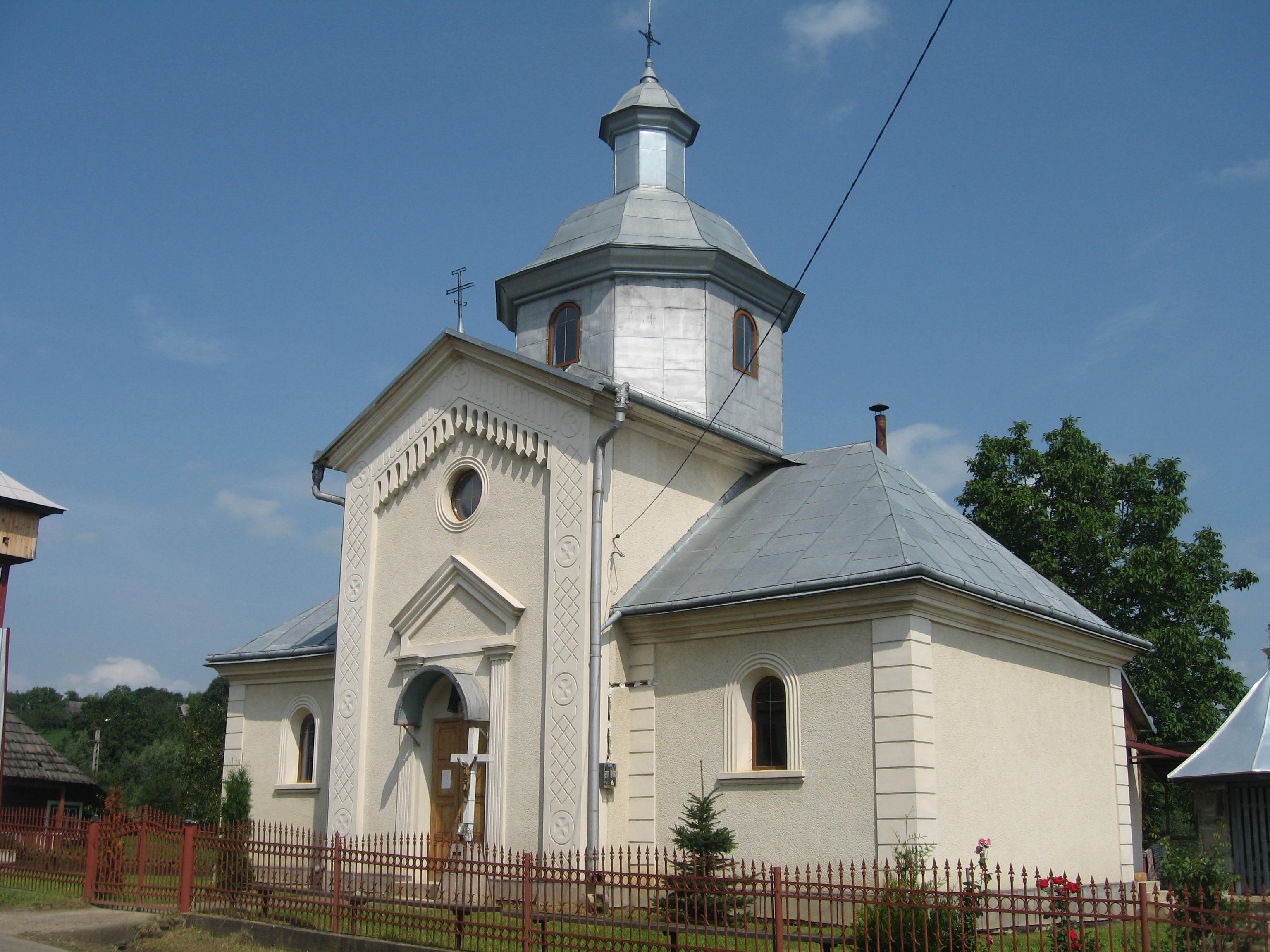 Biserica greco-catolica din Cacica